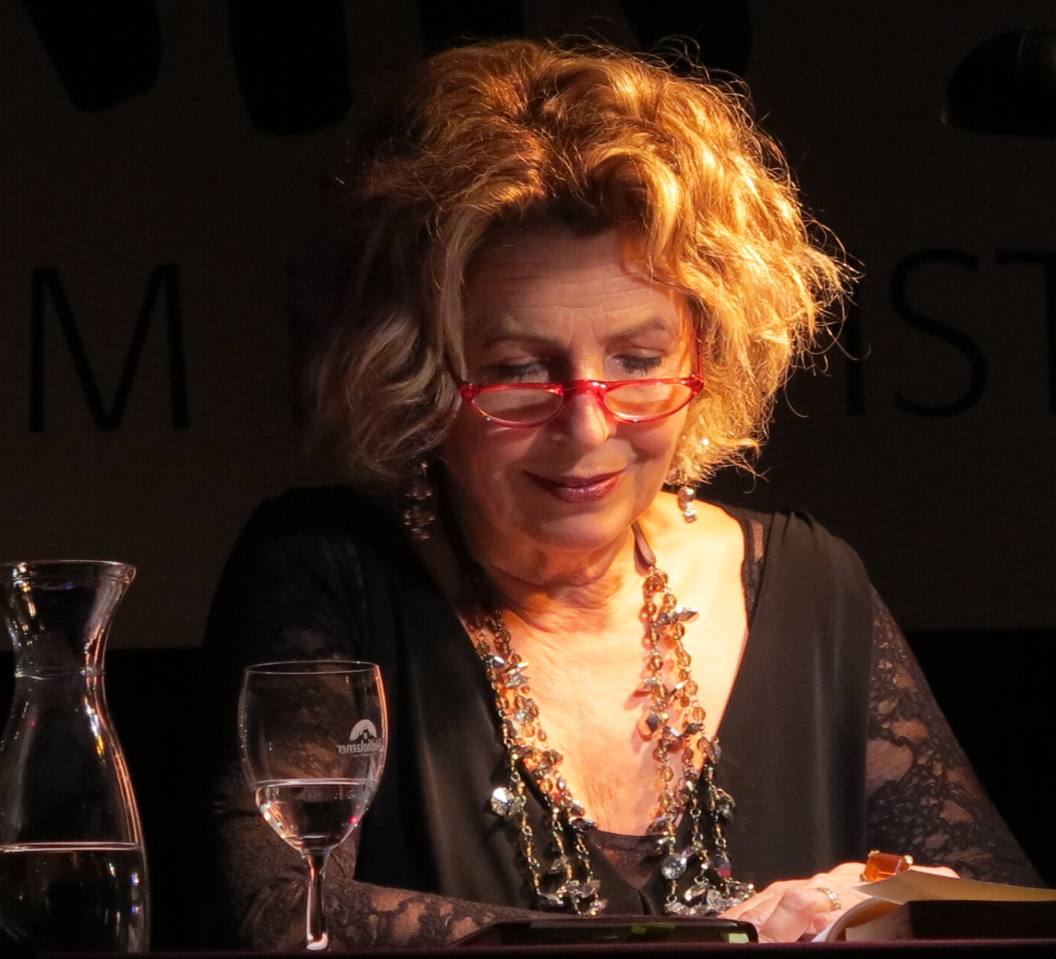 Die Schauspielerin Michaela May bei der Weihnachtsgeschichten-Lesung in der Gaststätte Zum Kirchsteig in Dießen am Ammersee im Dezember 2012